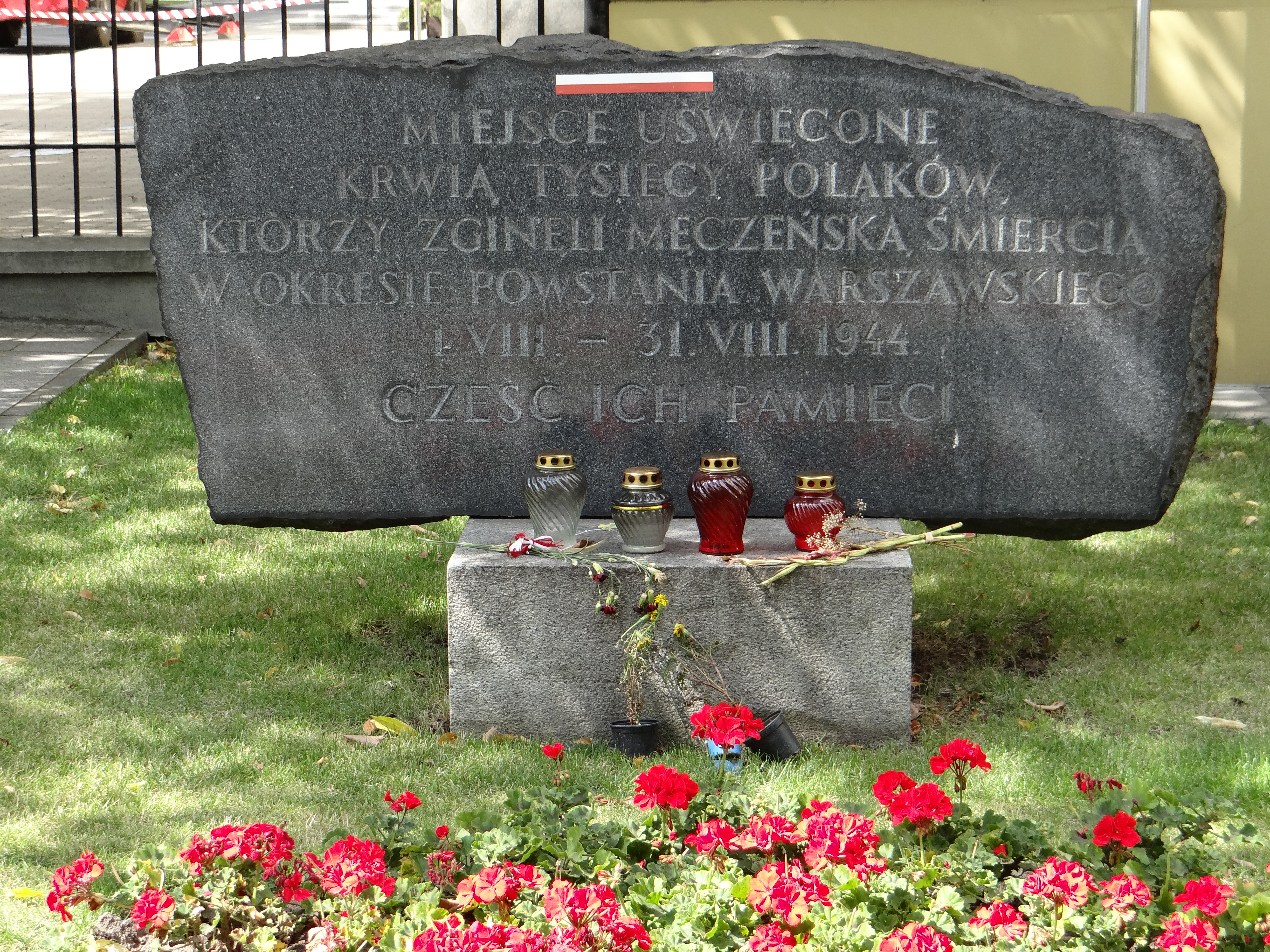 Płyta poświęcona Pamięci ofiar Powstania Warszawskiego ustawiona jest w Al Ujazdowskich 1/3 obok jednego z wejść do gmachu Urzędu Rady Ministrów